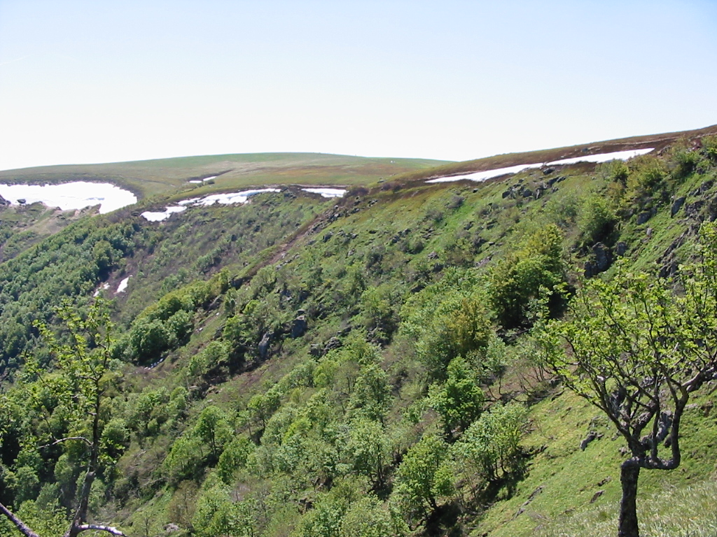 Versant alsacien du Kastelberg, massif des Vosges, France.